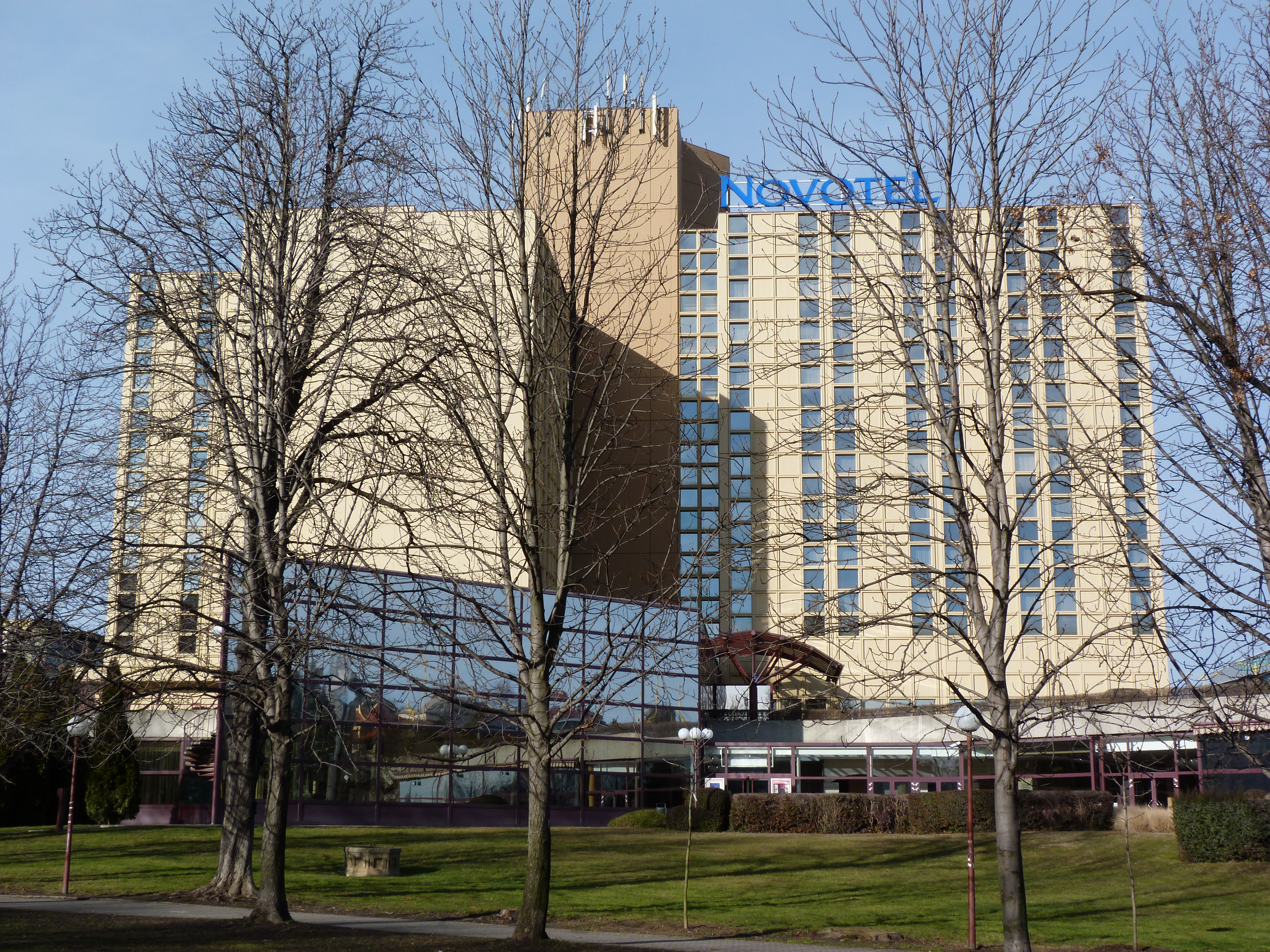 Hotel Novotel Budapest City, Budapest, Alkotás utca. A BAH csomópont felől. - - ©© Ajánlott hivatkozás: Derzsi Elekes Andor: Metapolisz DVD line